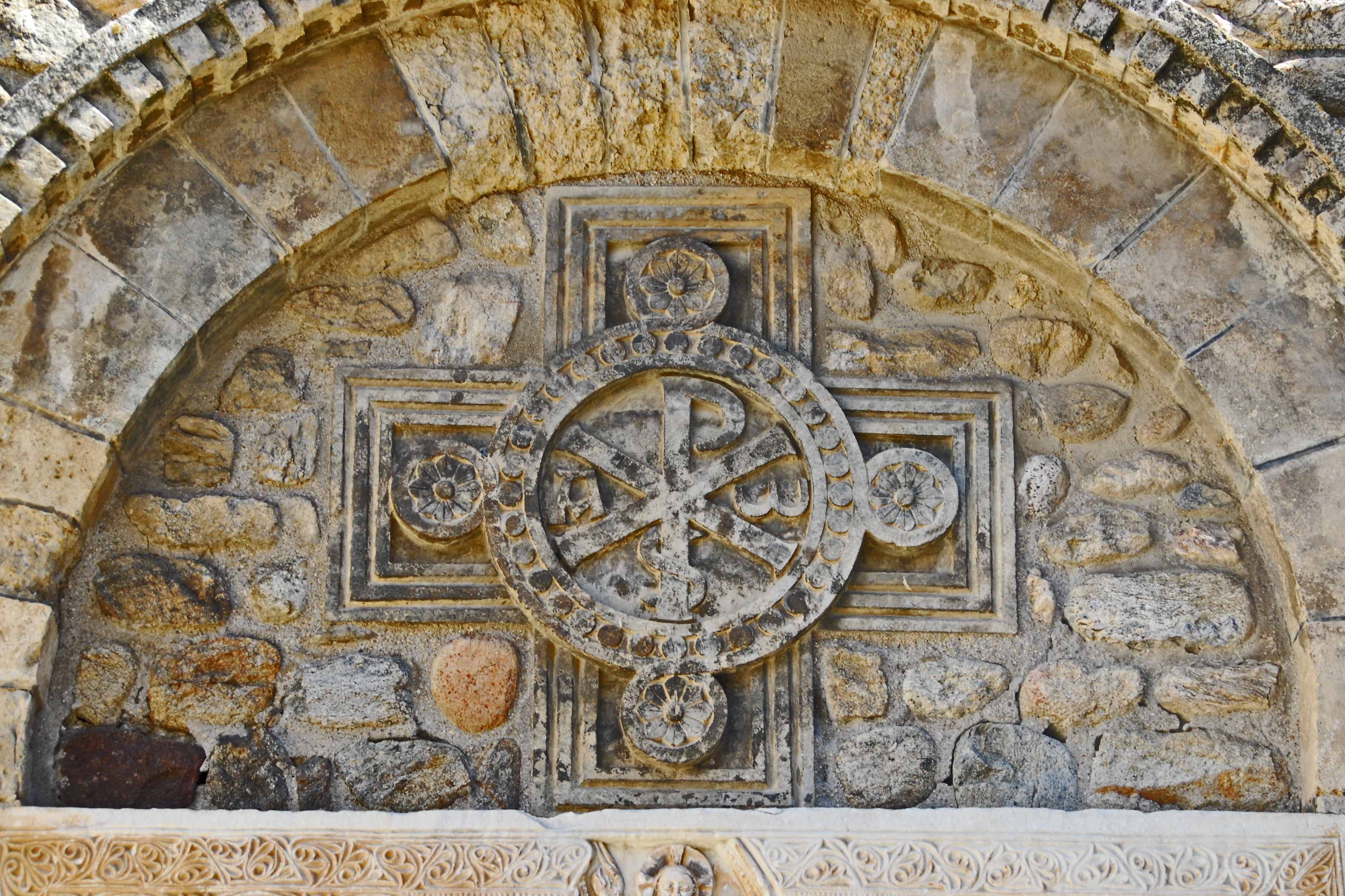 St-André-de-Sorède, Tympanon im Hauptportal